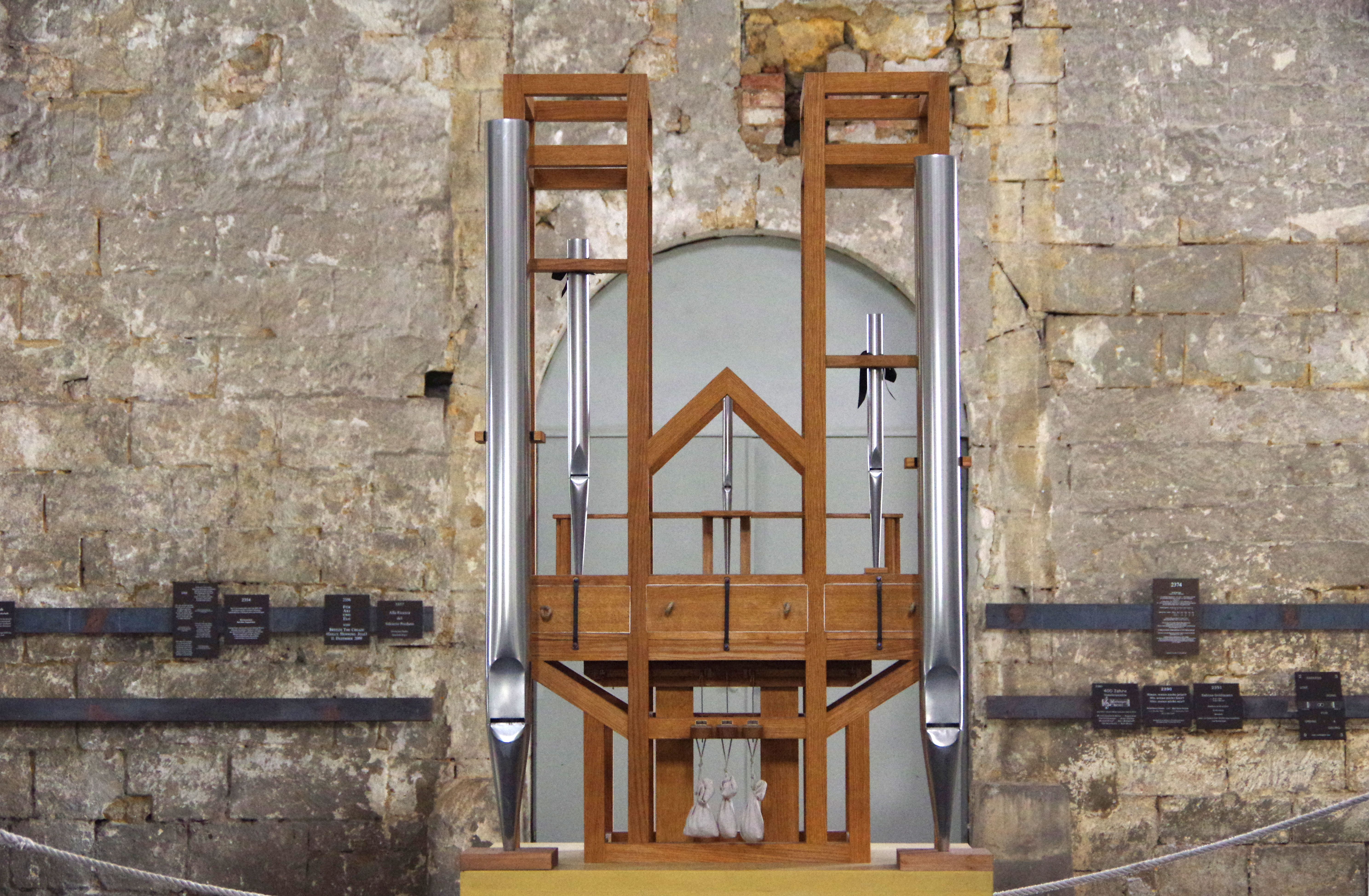 Halberstadt in Sachsen Anhalt. Die Orgel in der : für das Projekt ORGAN²/ASLSP von John Cage.